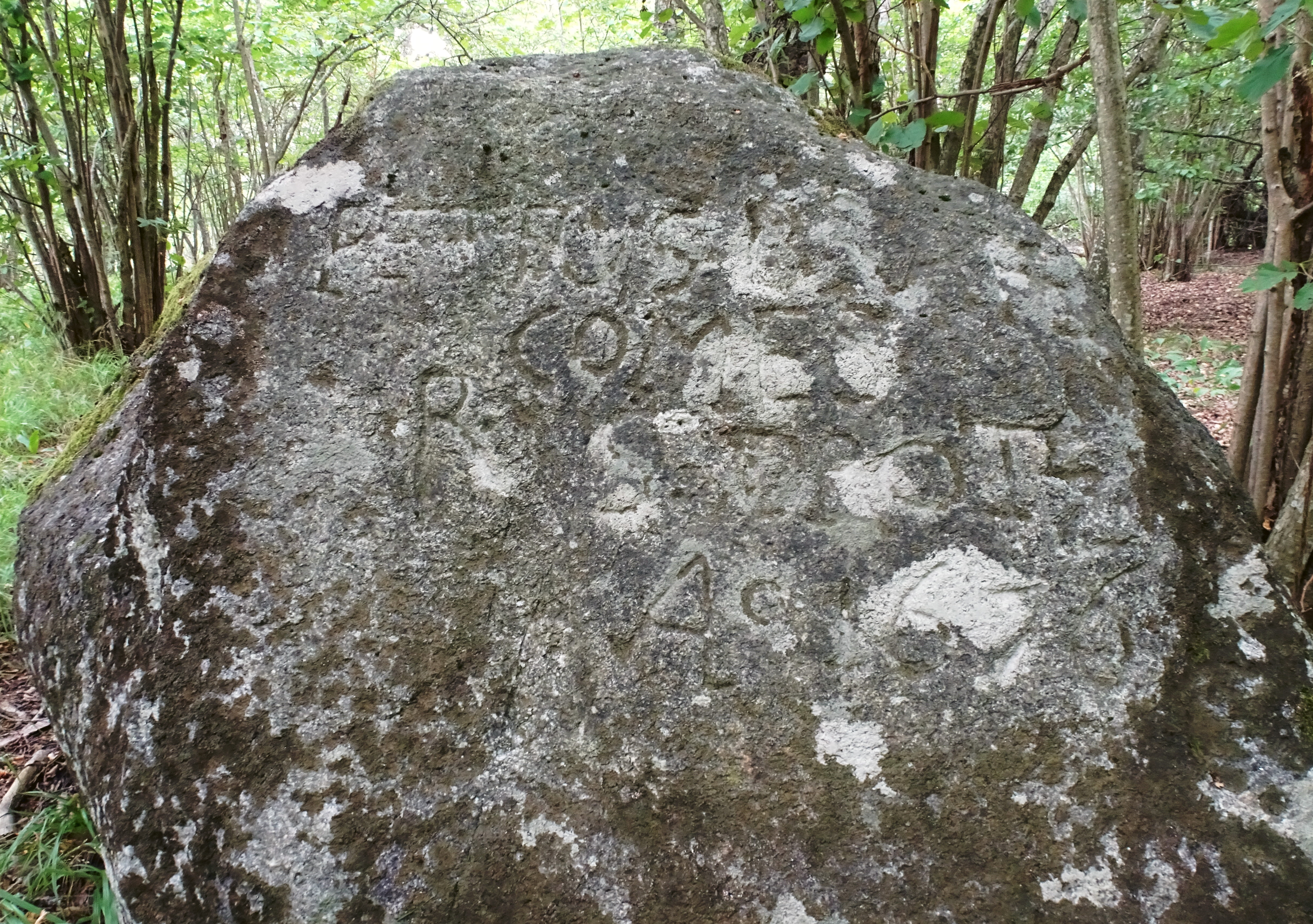 Gårdsstenen Bogesunds slott. PETRUS BRAHE COMES R S : DROTZ A° 1676 RAÄ-nummer Östra Ryd 169:1